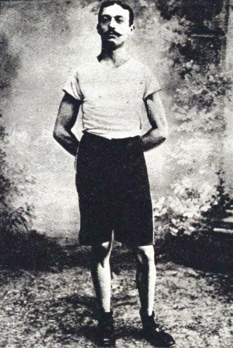 Henri Deloge en 1902.